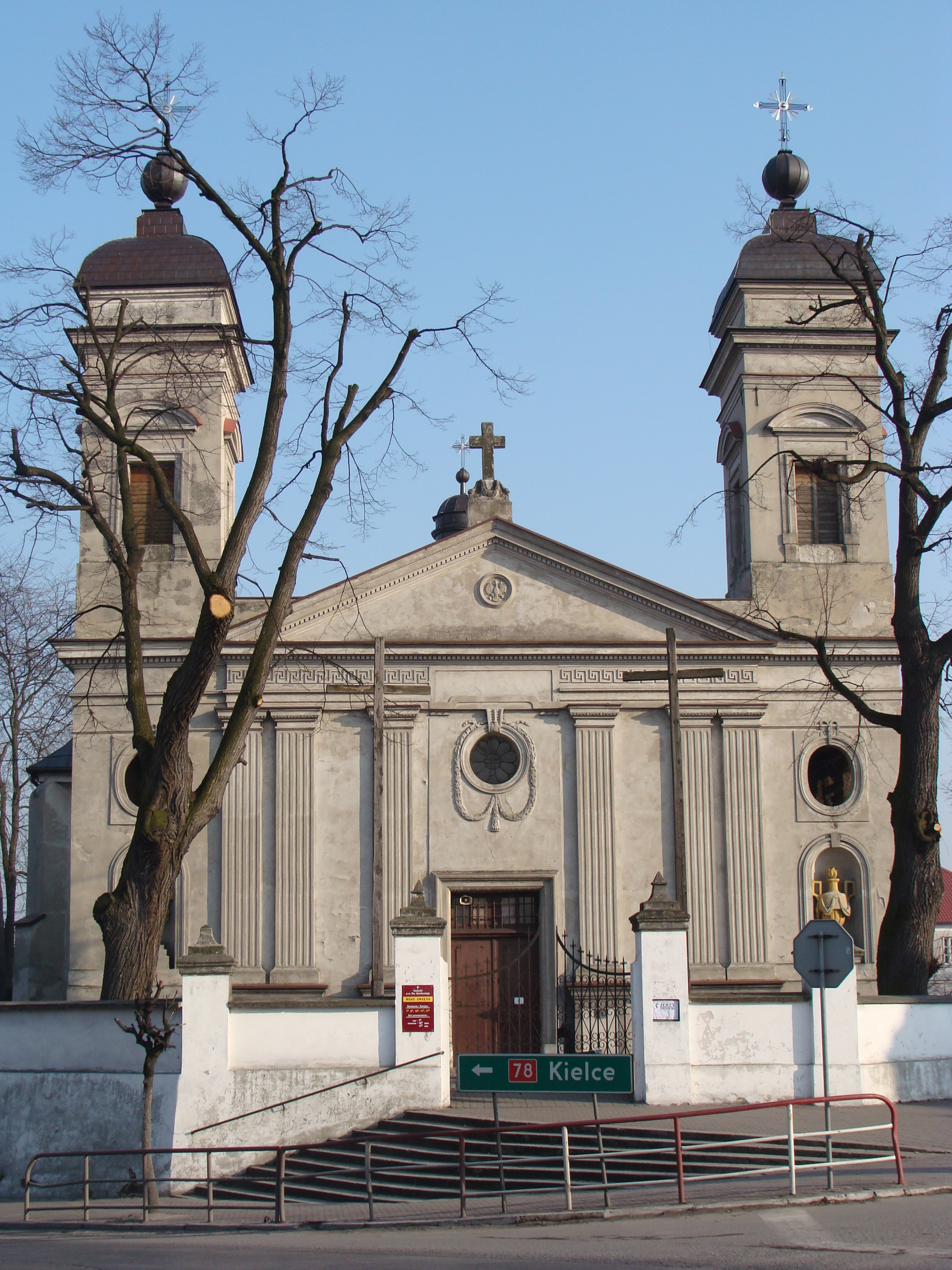 Kościół parafialny pw. św. Bartłomieja w Szczekocinach